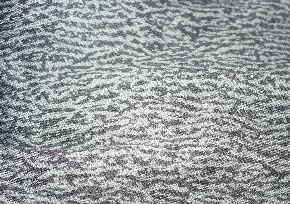 Tkanina z nadrukiem mora Wojsk Lotniczych i Obrony Powietrznej oraz Marynarki Wojennej - czarnym.